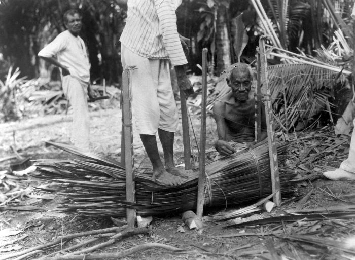 Repronegatief. Bij het atapvlechten worden sagobladeren gebundeld met gaba-gaba stengels voor het gebruik van dakbedekking, Molukken